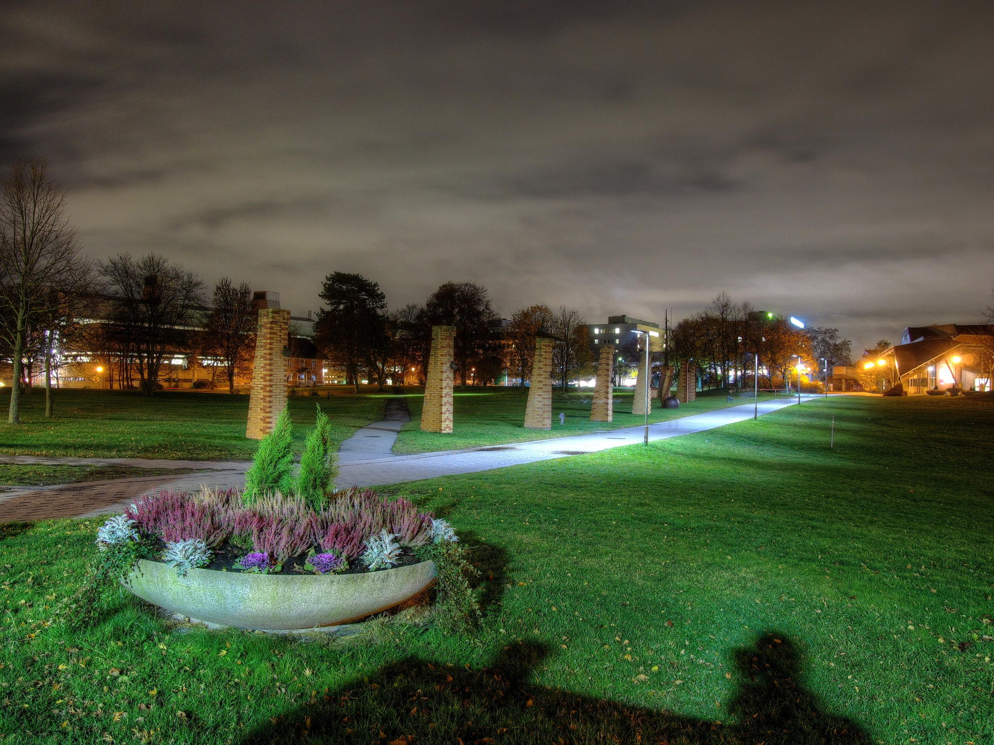 קמפוס פראסקטי, אוניברסיטת סטוקהולם